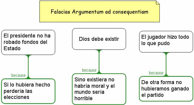 Se muestran argumentos usando la falacia recurrir a las consecuencias